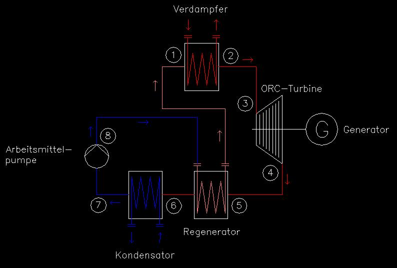 Fließbild eines vereinfachten ORC-Prozesses